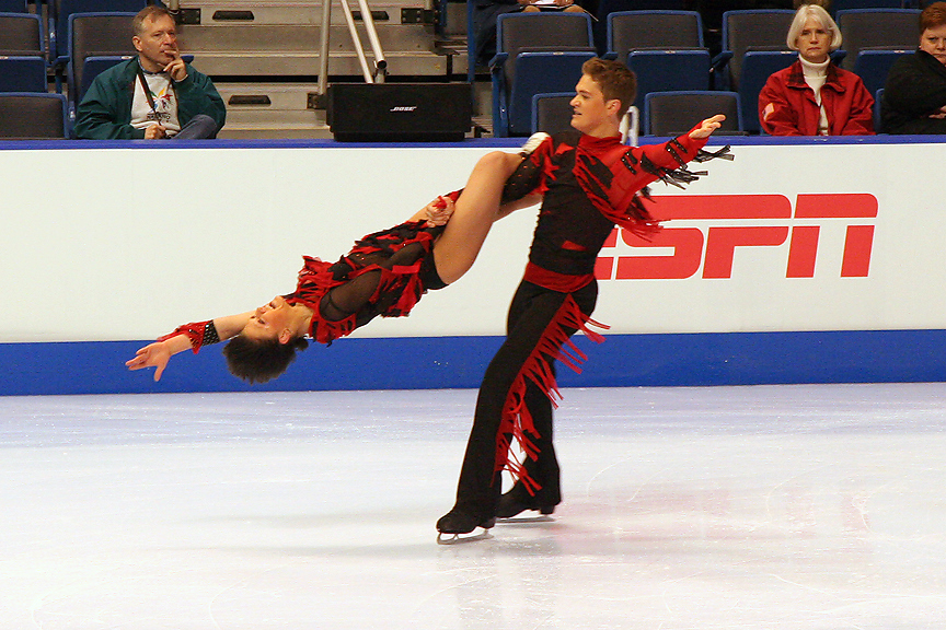 Alexandra Zaretski & Roman Zaretski perform a lift at the 2006 Skate America.